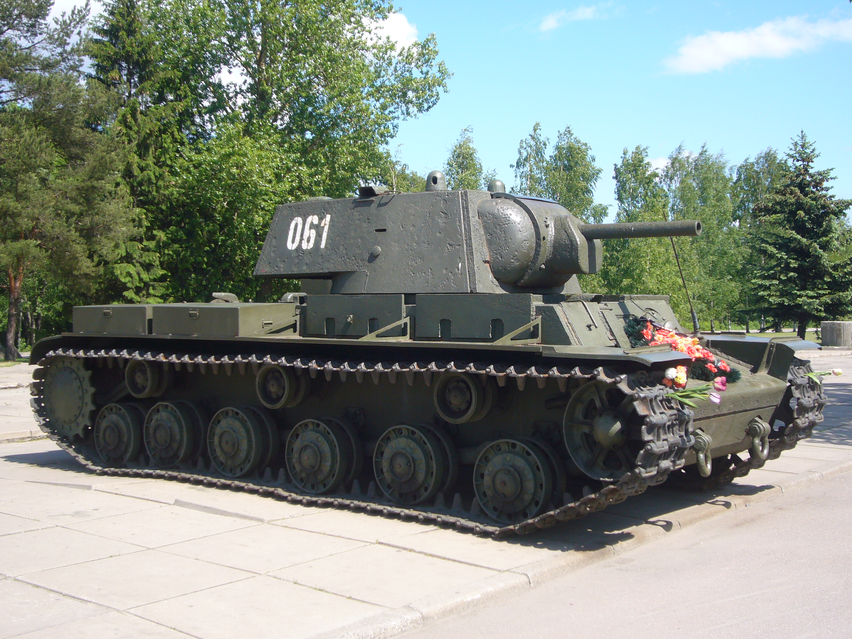 КВ-1 у диорамы «Прорыв блокады Ленинграда». Вид спереди-справа